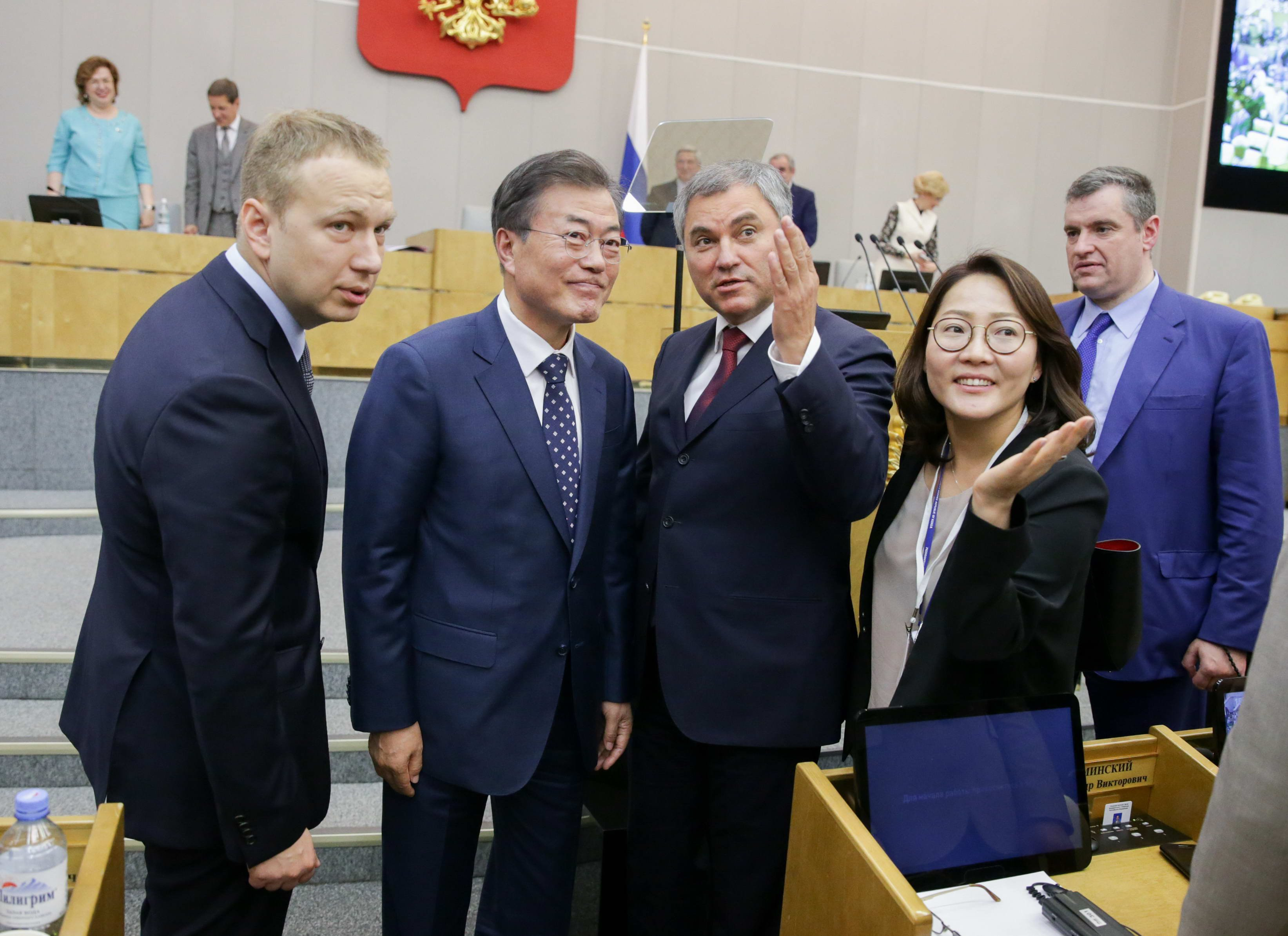 Moon Jae-in in the Russian State Duma (2018-06-21)